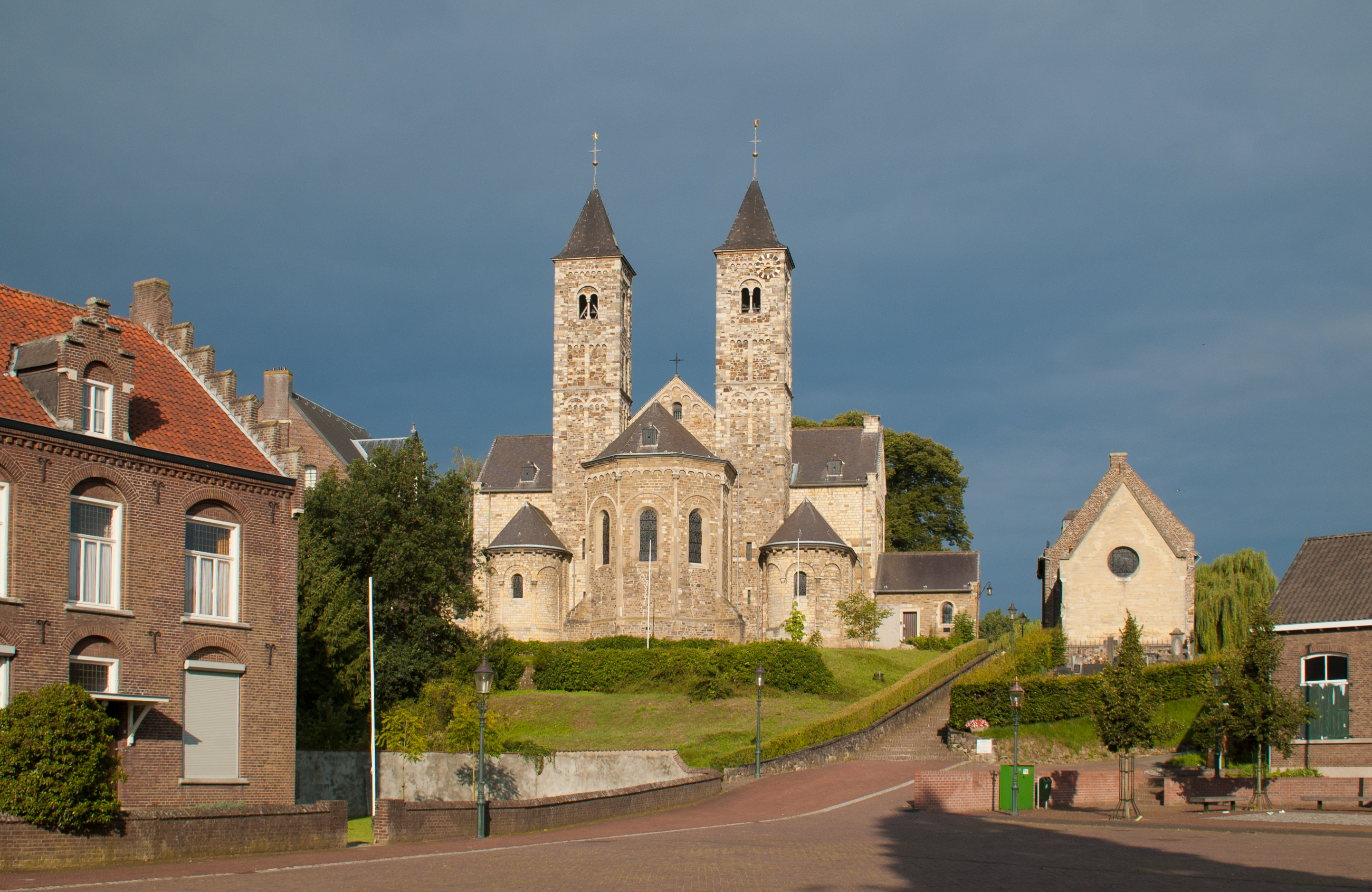 Der Kirchhügel in St. Odilienberg mit links der Basilika St. Wiro, Plechelmus und Otgerus (Kerkplein 15, Rijksmonument 33643) und rechts der Onsere Leve Vrouwekapel, der ursprünglichen Pfarrkirche (Kerkplein 12, Rijksmonument 33642). Links unten (angeschnitten)das Pastoratsgebäude von 1890 (Kerkpein 11, Rijksmonument 522670) 41″ N, 5° 59′ 53.84″ E